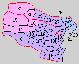 三重県三重郡・朝明郡の町村制時点の町村。